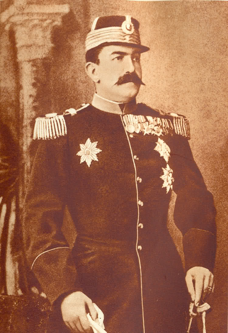 Kralj Milan I Obrenović, prvi kralj Srbije posle kosovskog boja, Naslednik kneza Mihajla Obrenovića i otac kralja Aleksandra Obrenovića